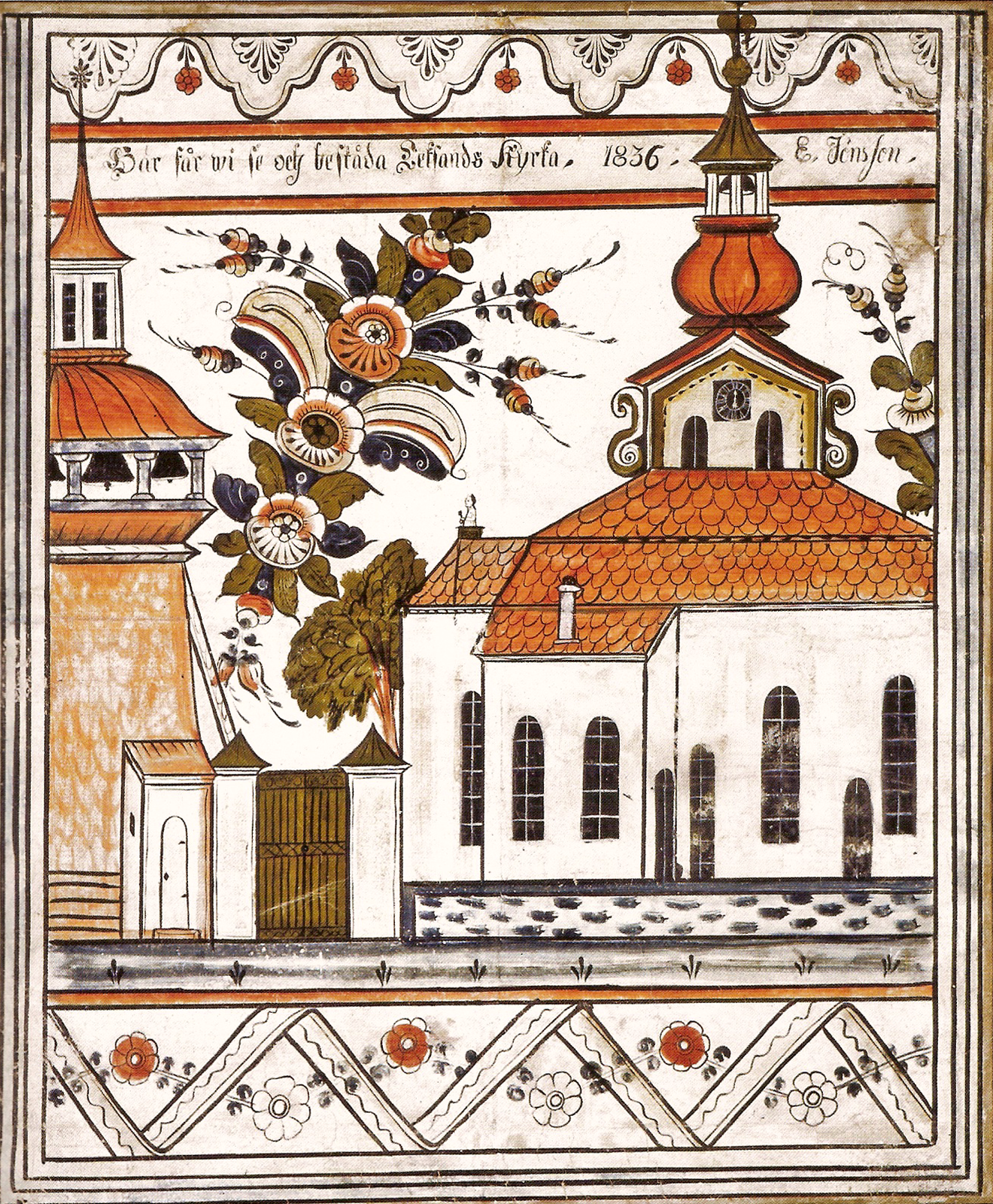 Målning föreställande Leksands kyrka. Av dalmålaren Kers Erik Jönsson. Privat ägo.